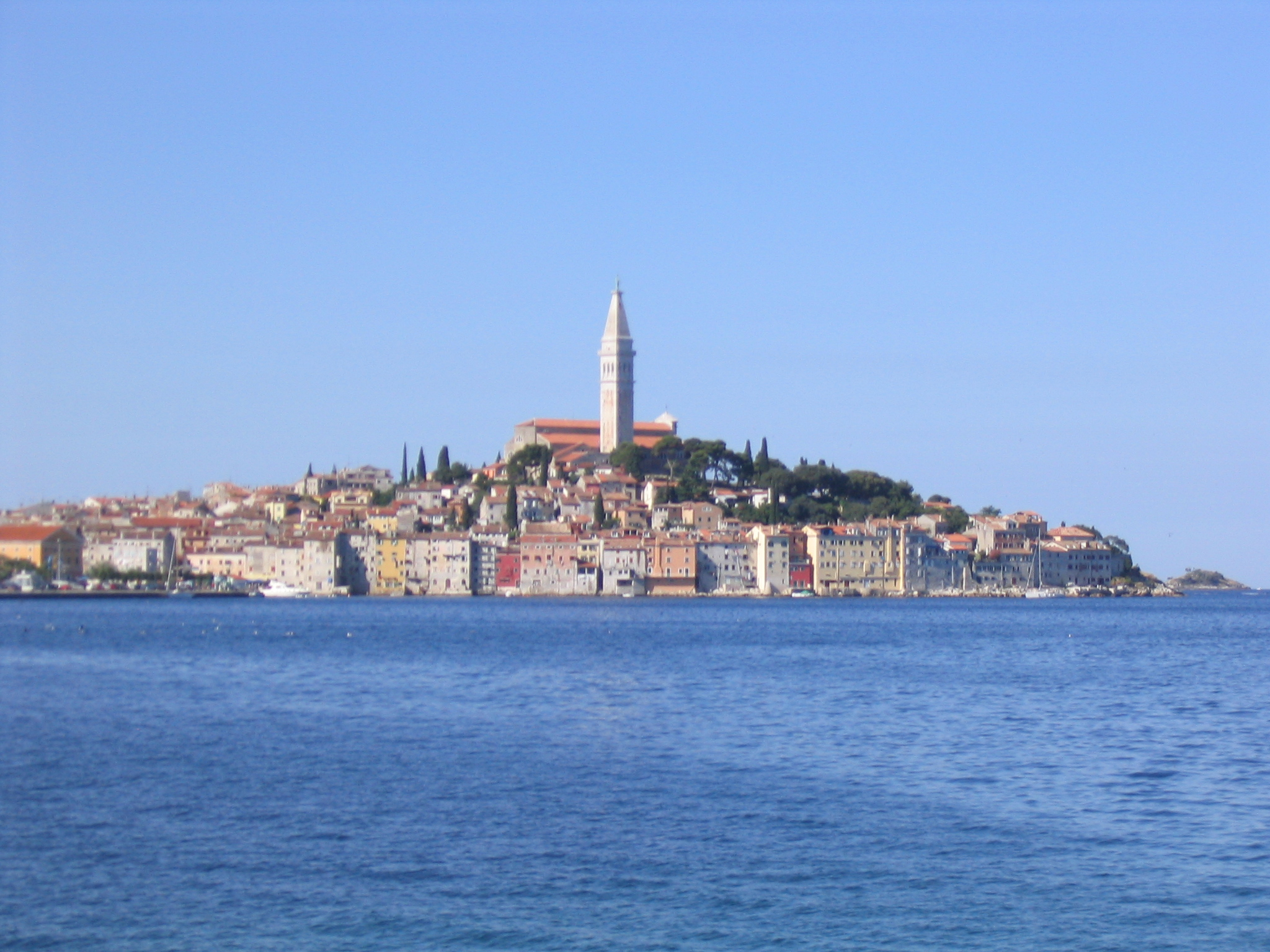 Rovinj